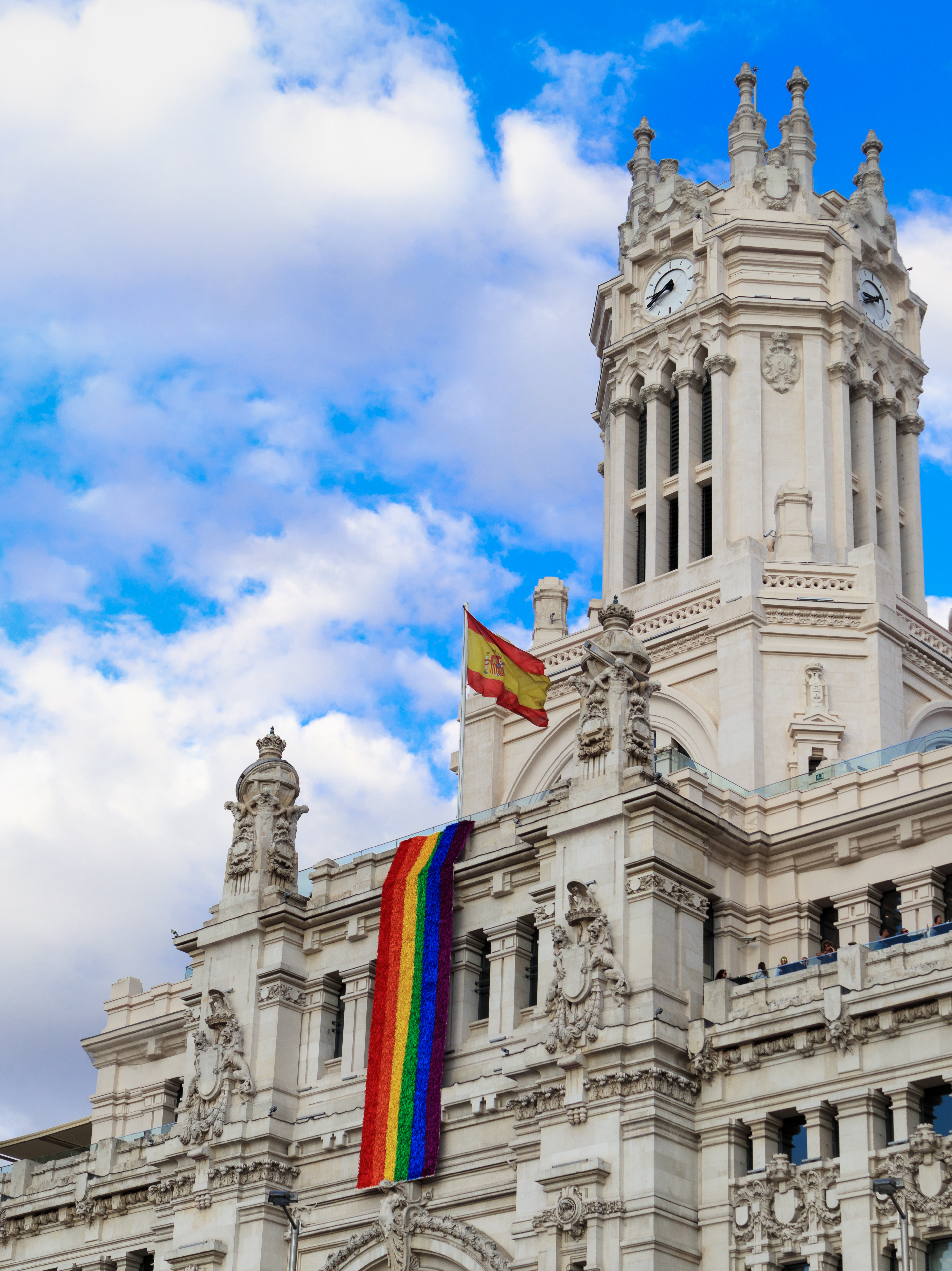 Bandera arcoiris en la fachada del Palacio de Correos, Madrid.